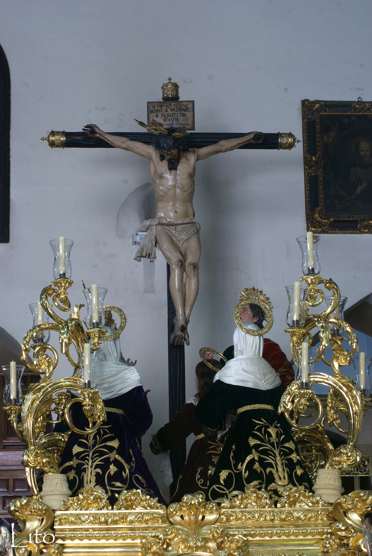 Misterio de las Siete Palabras